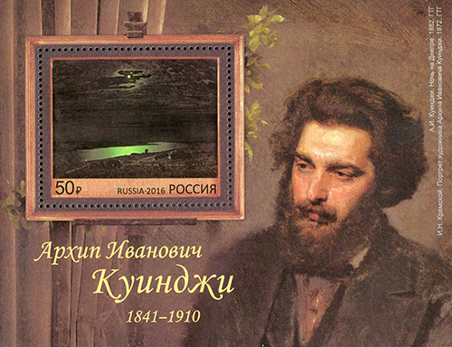 Почтовый блок 175 лет со дня рождения А.И. Куинджи (1841–1910)